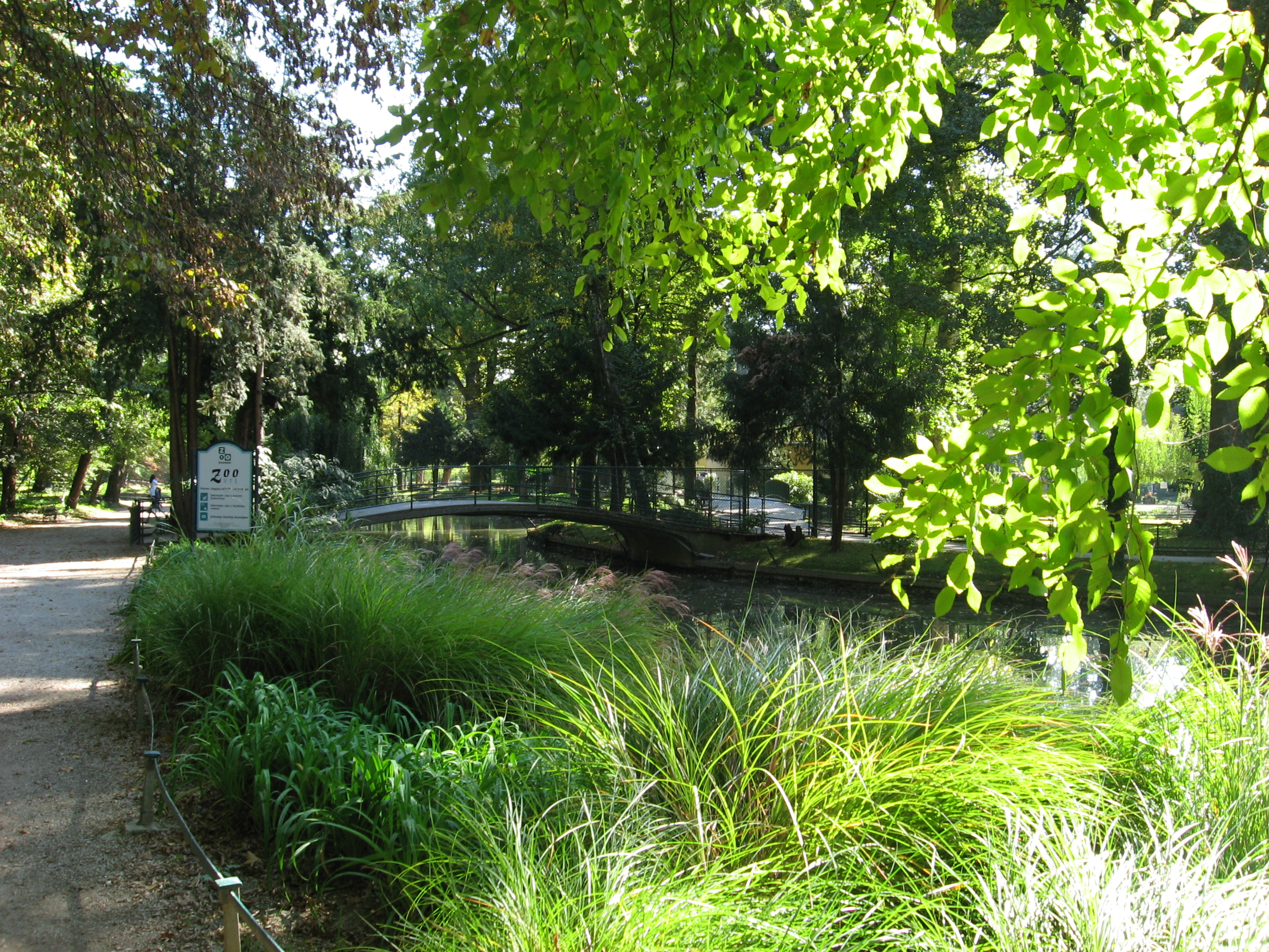 Zoološki vrt Maksimir